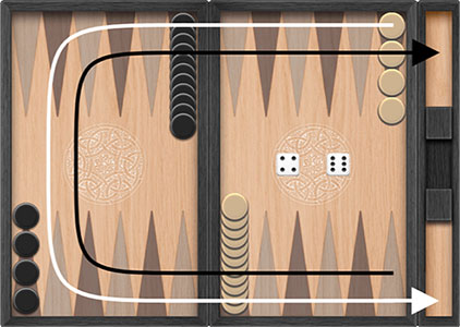 Хачапури – расстановка